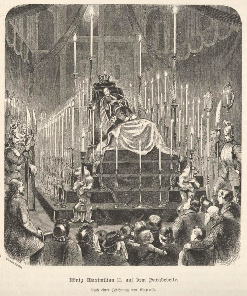 Aufbahrung König Max II. Joseph von Bayern (1864), Zeichnung von Karl Appold (1840-1884)